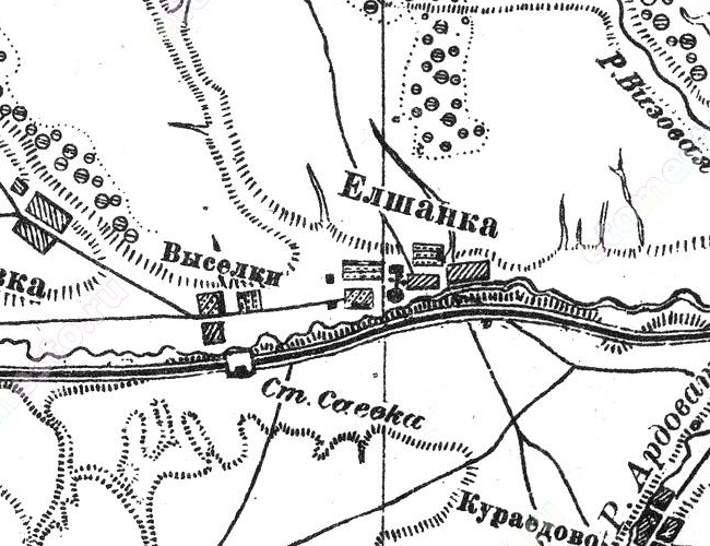 Село Елшанка на трёхвёрстной карте Шуберта Симбирской губернии 1870-1919 г..